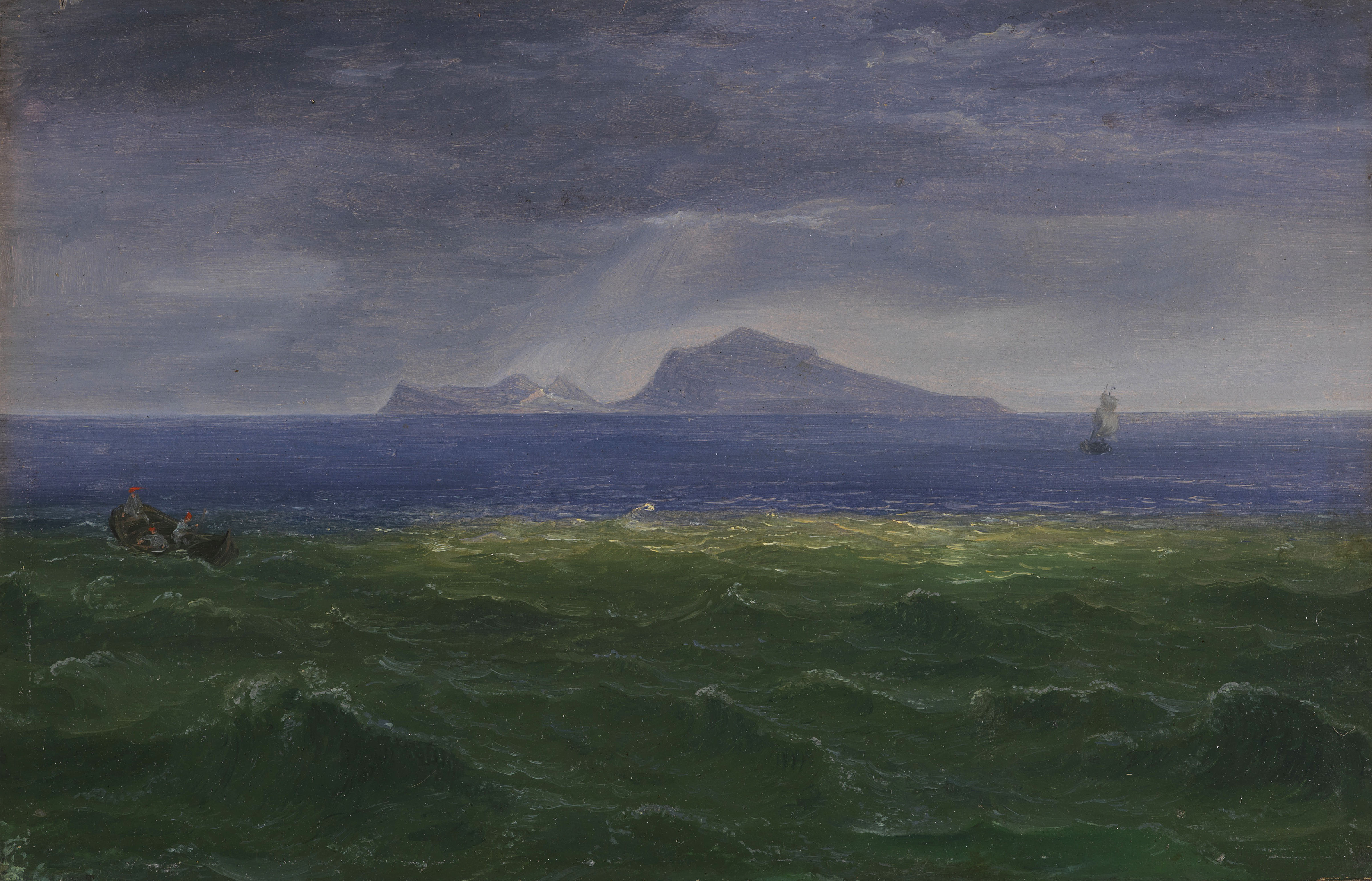 Kleine Marine mit Blick auf Capri. Ca. 1823. Öl auf Papier, auf Leinwand kaschiert. 23 x 35,5 cm. Verso auf dem Keilrahmen handschriftlich bezeichnet u.a. "Ischia" [sic] und datiert. Möglicherweise handelt es sich bei diesem Gemälde um "Die kleine Marine der Insel Capri. Morgen", die 1830 auf der Berliner Akadmie-Ausstellung gezeigt wurde.